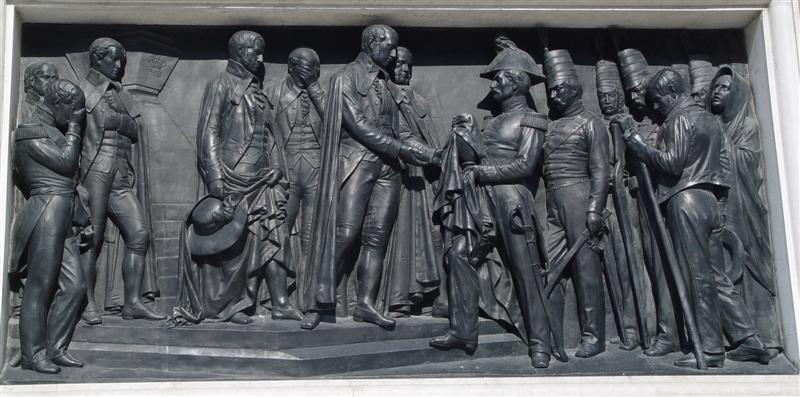 Relevo no pedestal da estátua a D. Pedro IV no Porto. Foto: Jose Goncalves